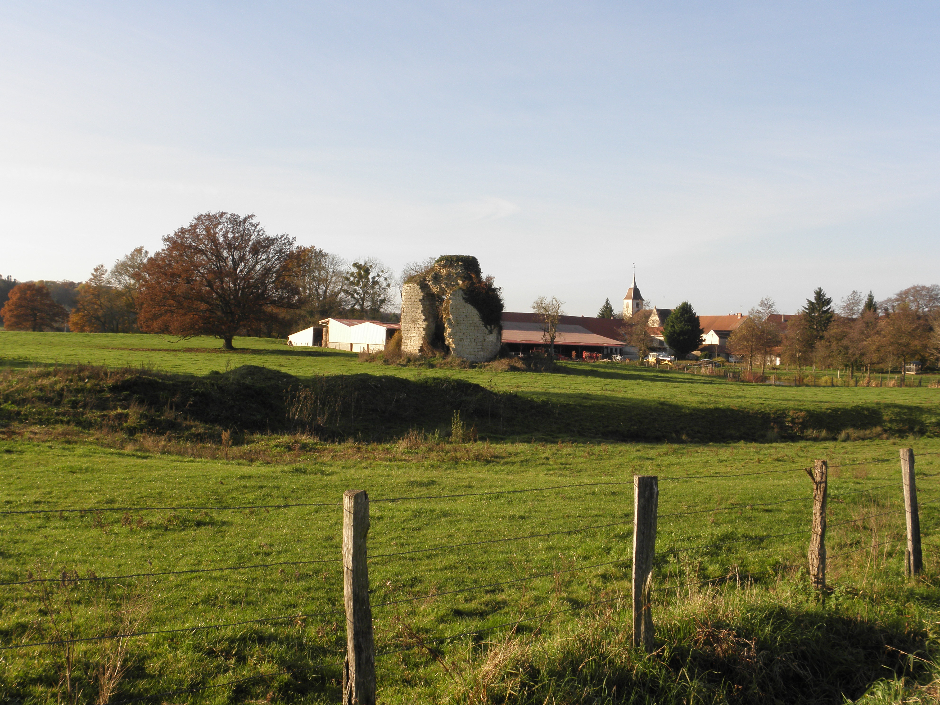 CHAMPTONNAY emplacement du chateau et tour de La Chapelle